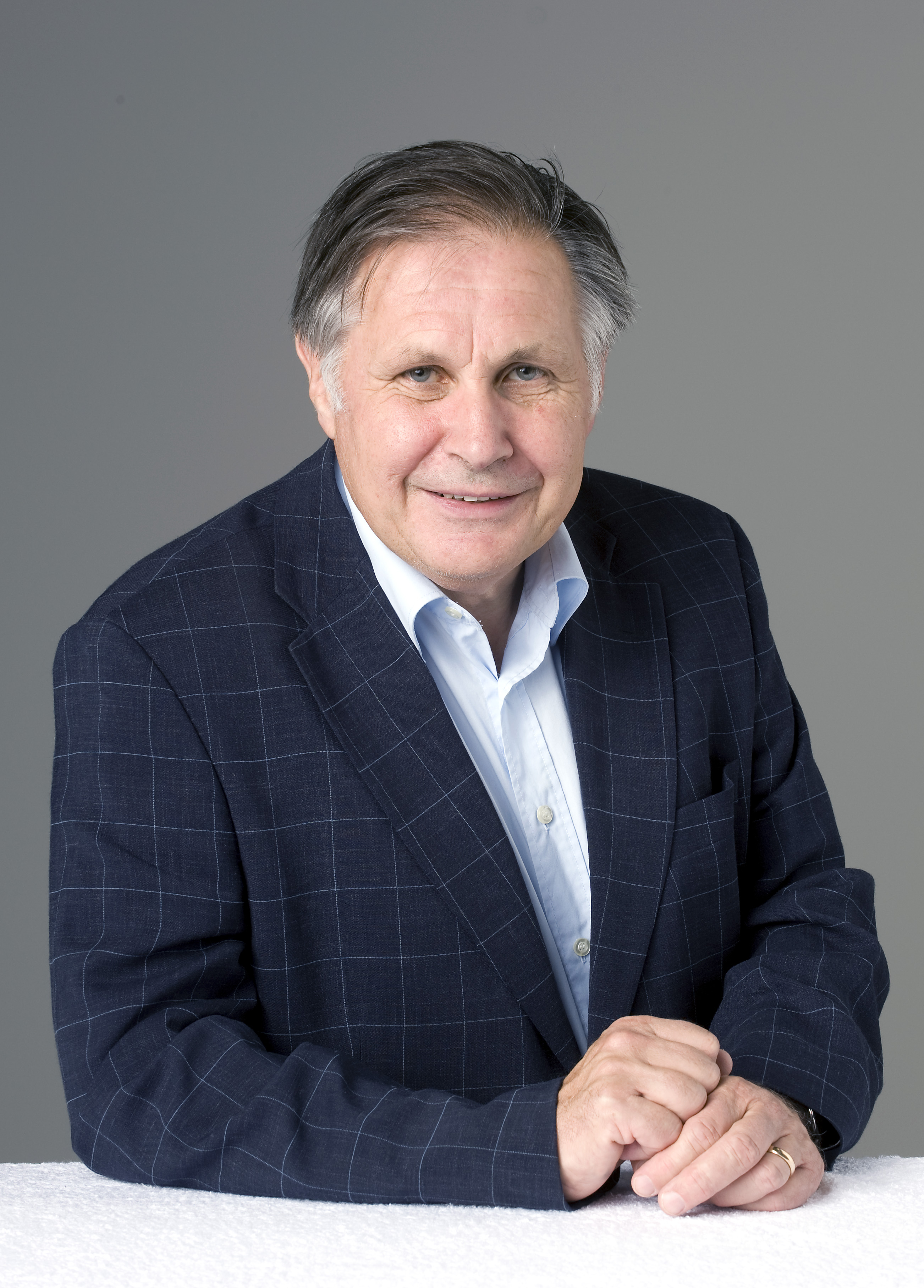 Läkaren Hugo Lagercrantz.